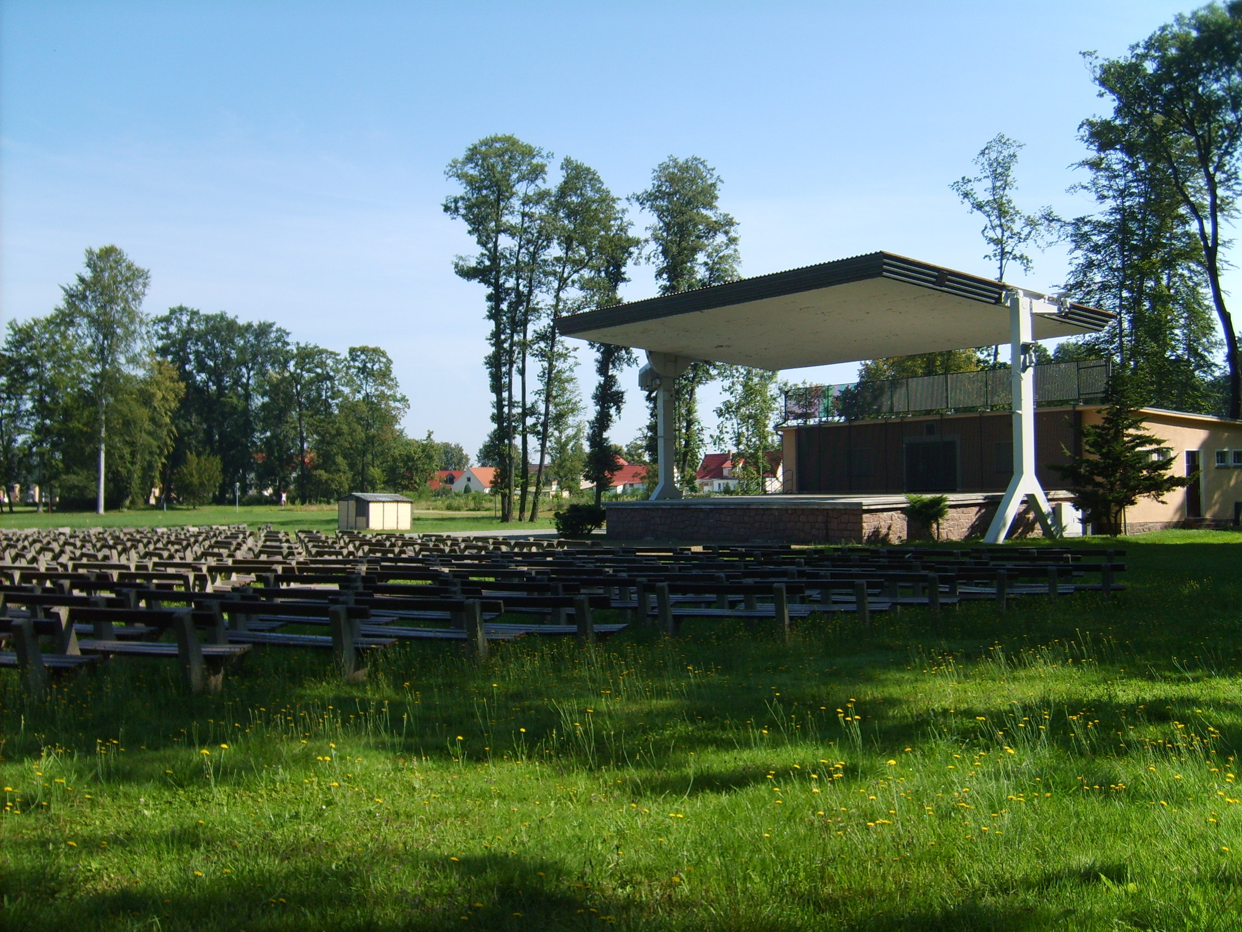 Bühne im Schlosspark Lauchhammer-West